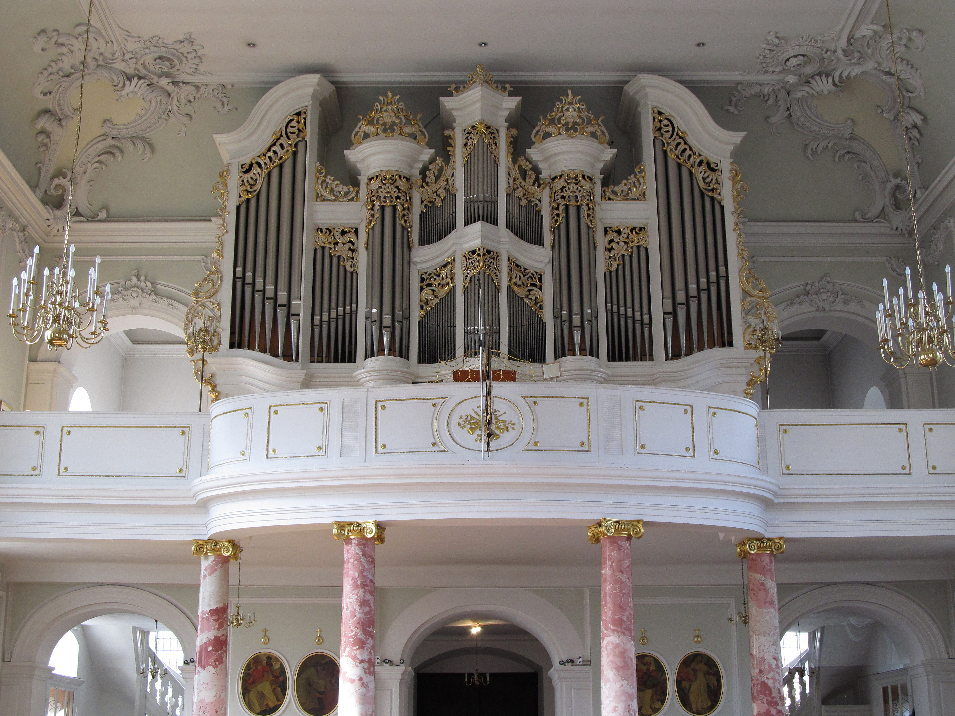 Orgelempore der Basilika St. Johann in Saarbrücken, Saarland